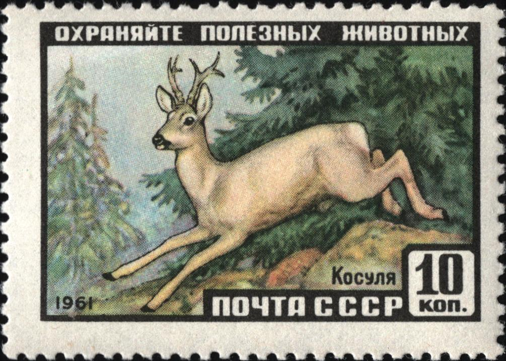 Косуля. Художник: А. Комаров. Марки СССР, номинал - 10коп.